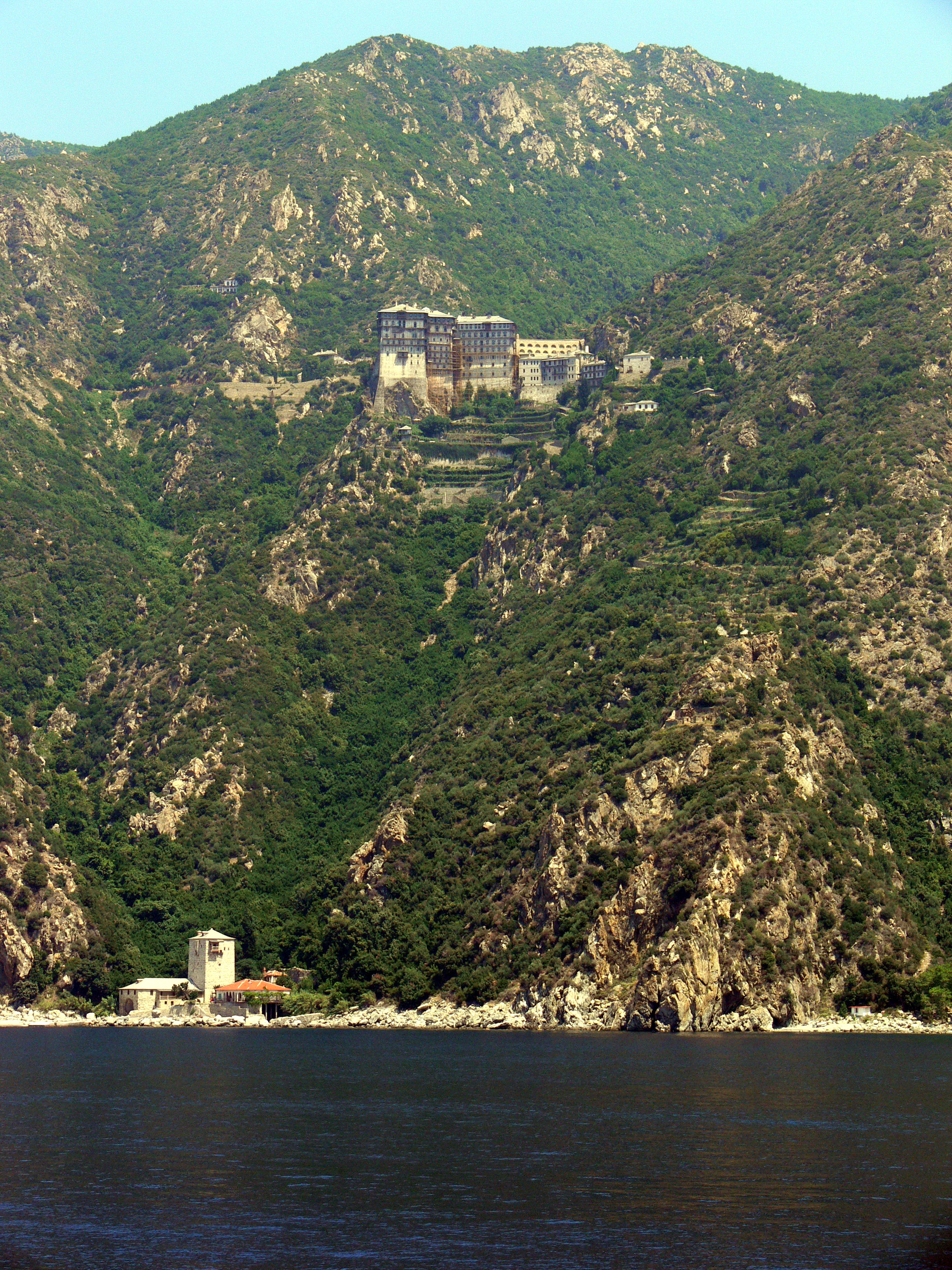 Kloster Simon Petra